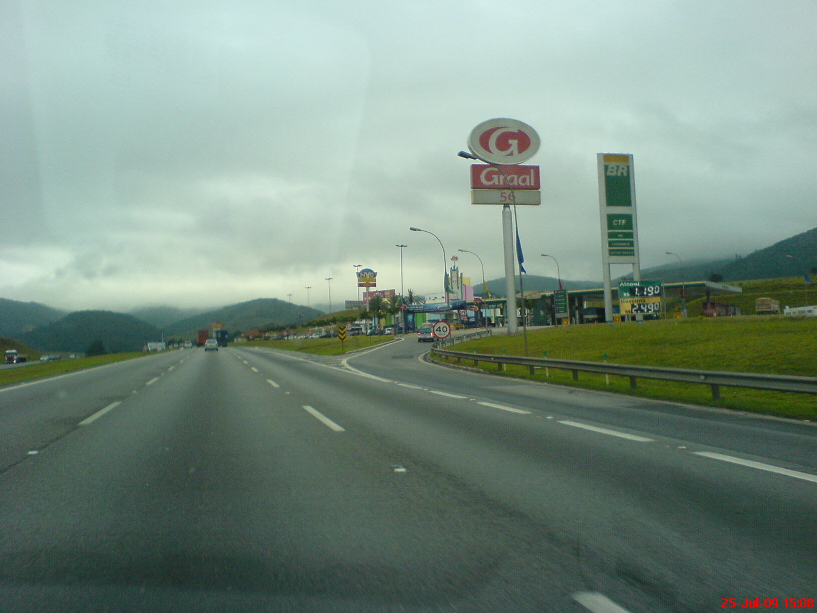 Graal - Rod dos Bandeirantes